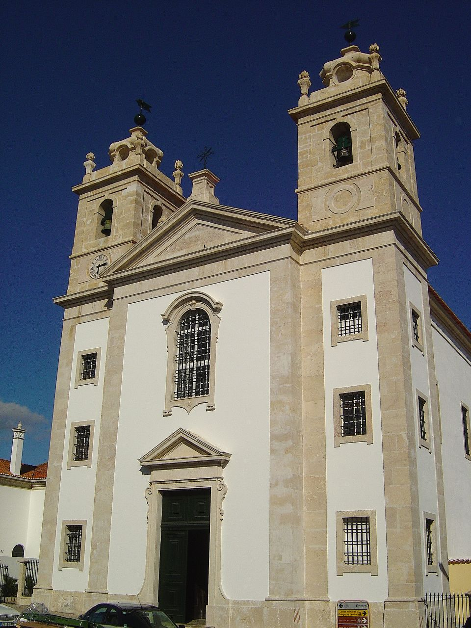 Igreja Matriz de Sobral de Mte. Agraço